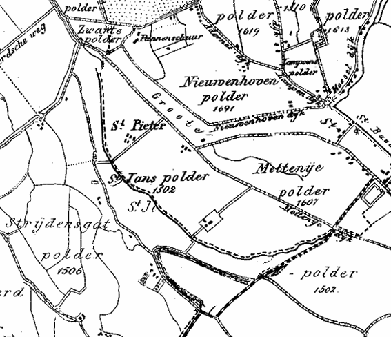 Sint Janspolder